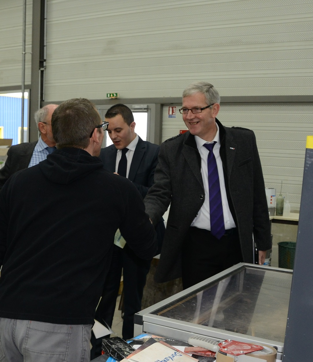 Michel Dagbert en visite d'entreprise